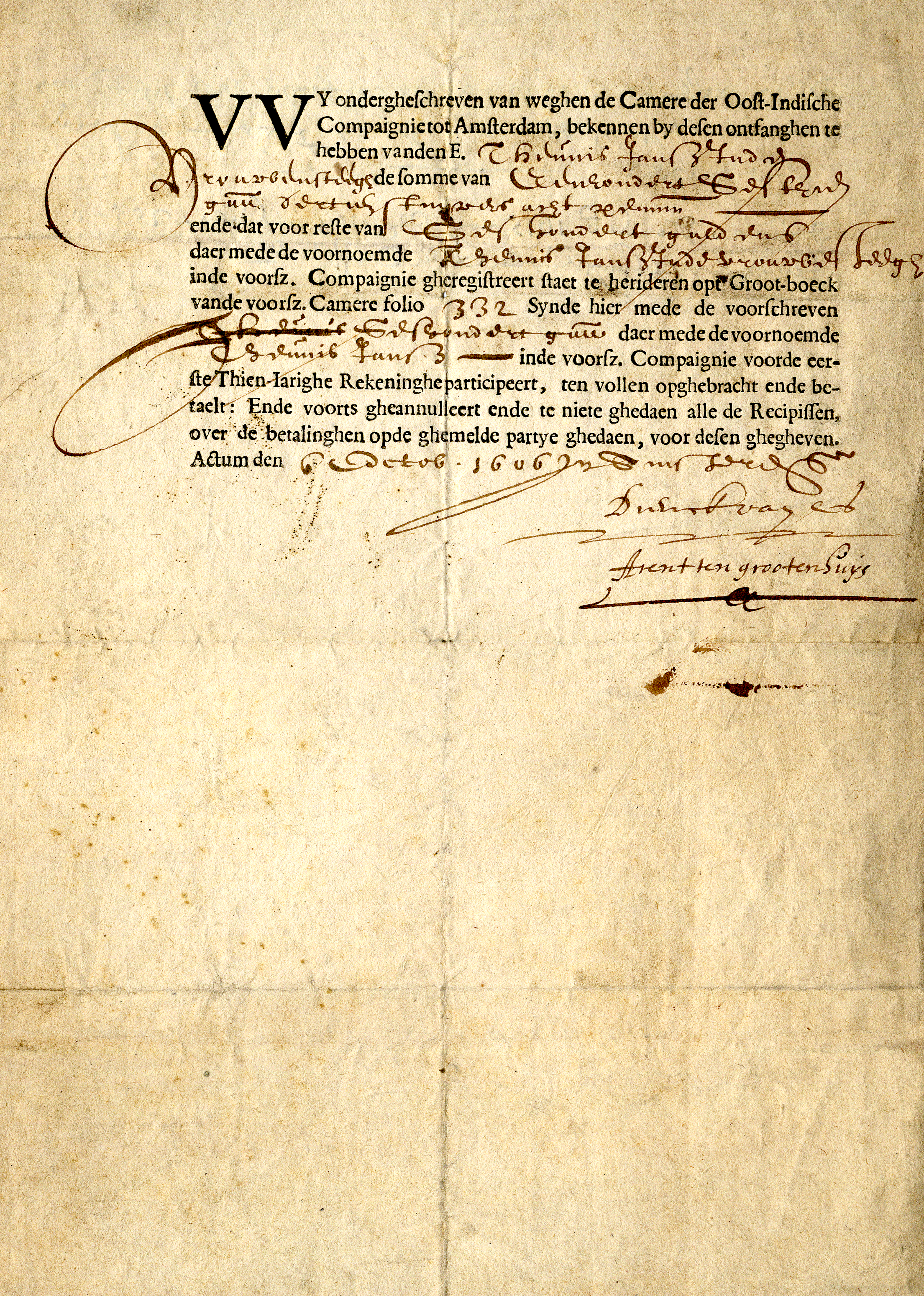 VOC aandeel 6 oktober 1606 uitgeschreven aan Theunis Jansz. 39 x 28,5 cm Wy ondergheschreven van weghen de Camere der Oost-Indische Compaignie tot Amsterdam, bekennen by desen ontfanghen te hebben vanden E(dele) Theunis Jansz Inden Vrouwensteegh de somme van Eenhondert Sesthien gu(lde)n dertien stuijvers acht penn(inghe)n ende dat voor reste van Seshondert guldens daer mede de voornoemde Theunis Jansz Inde Vrouwesteegh inde voorsz(egde) Compaignie gheregistreert staet te herideren opt Groot-boeck vande voorsz(egde) Camere folio 332 Synde hier mede de voorschreven Seshondert gu(lde)n daer mede de voornoemde Theunis Jansz in de voorsz(egde) Compaignie voor de eerste Thien-Iarighe Rekeninghe participeert, ten vollen opghebracht ende betaelt: Ende voorts gheannulleert ende te niete ghedaen alle de Recipissen, over de betalinghen op de ghemelde partye ghedaen, voor desen ghegheven. Actum den 6 Octob(er) 1606 In Amsterd(amm)e Getekend door: Dierck van Os Arent ten Grootenhuijs